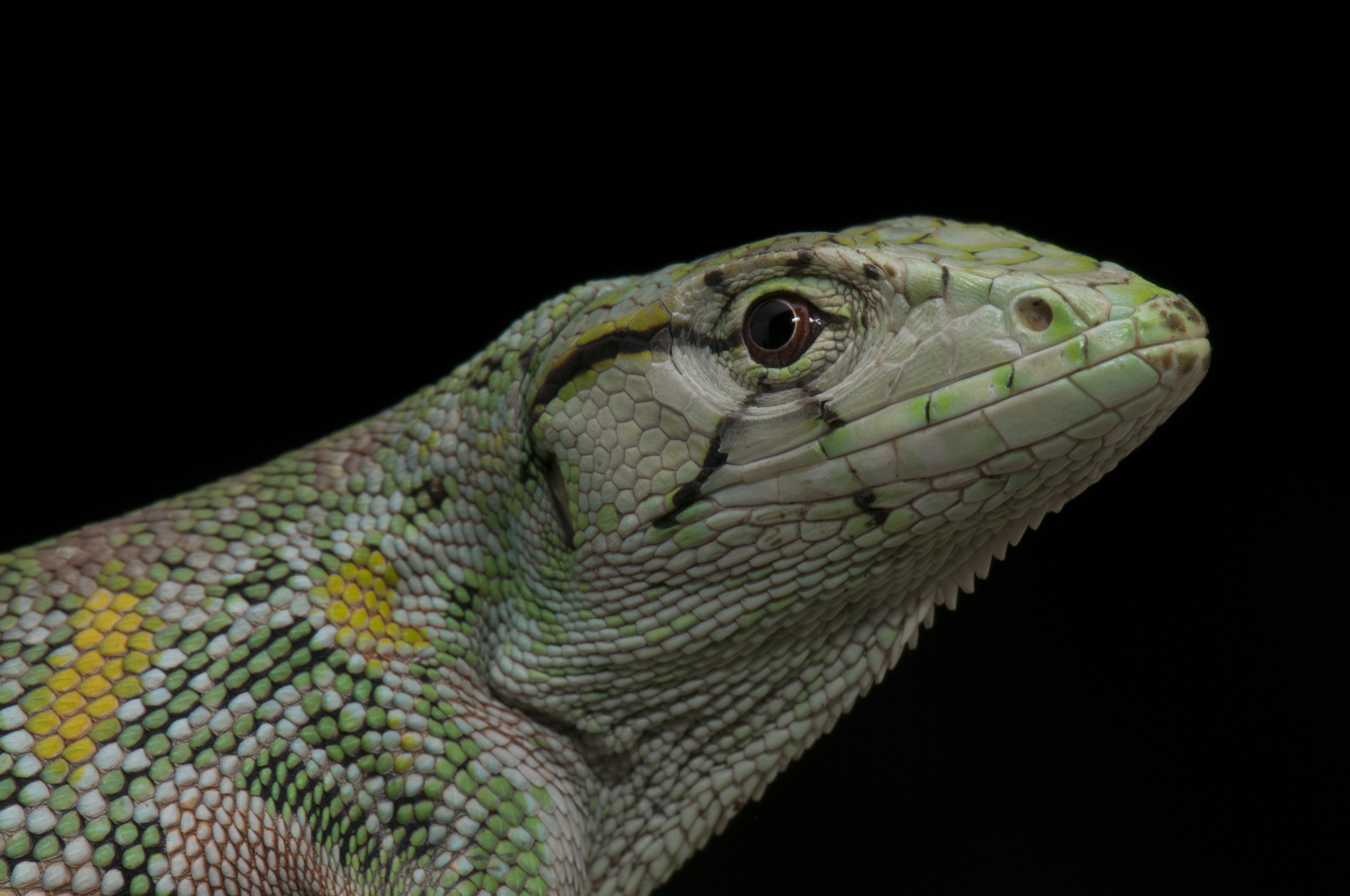 Conhecido também como; lagarto preguiça, papa-vento e camaleão falso. Espécie ocorrente da mata atlântica e floresta amazônica, arborícola de difícil visualização pois vive nas partes mais altas da floresta.